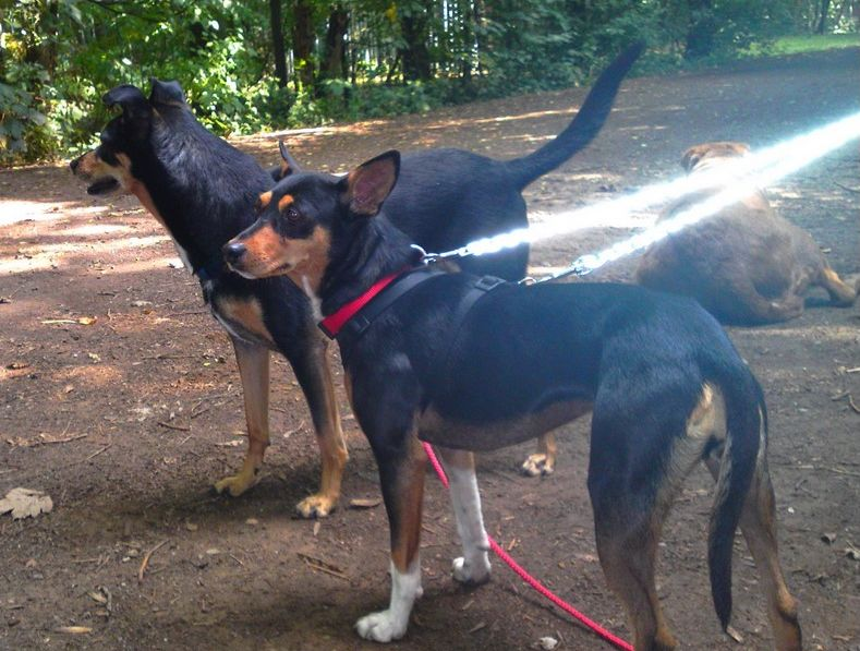 Gossos raters valencians